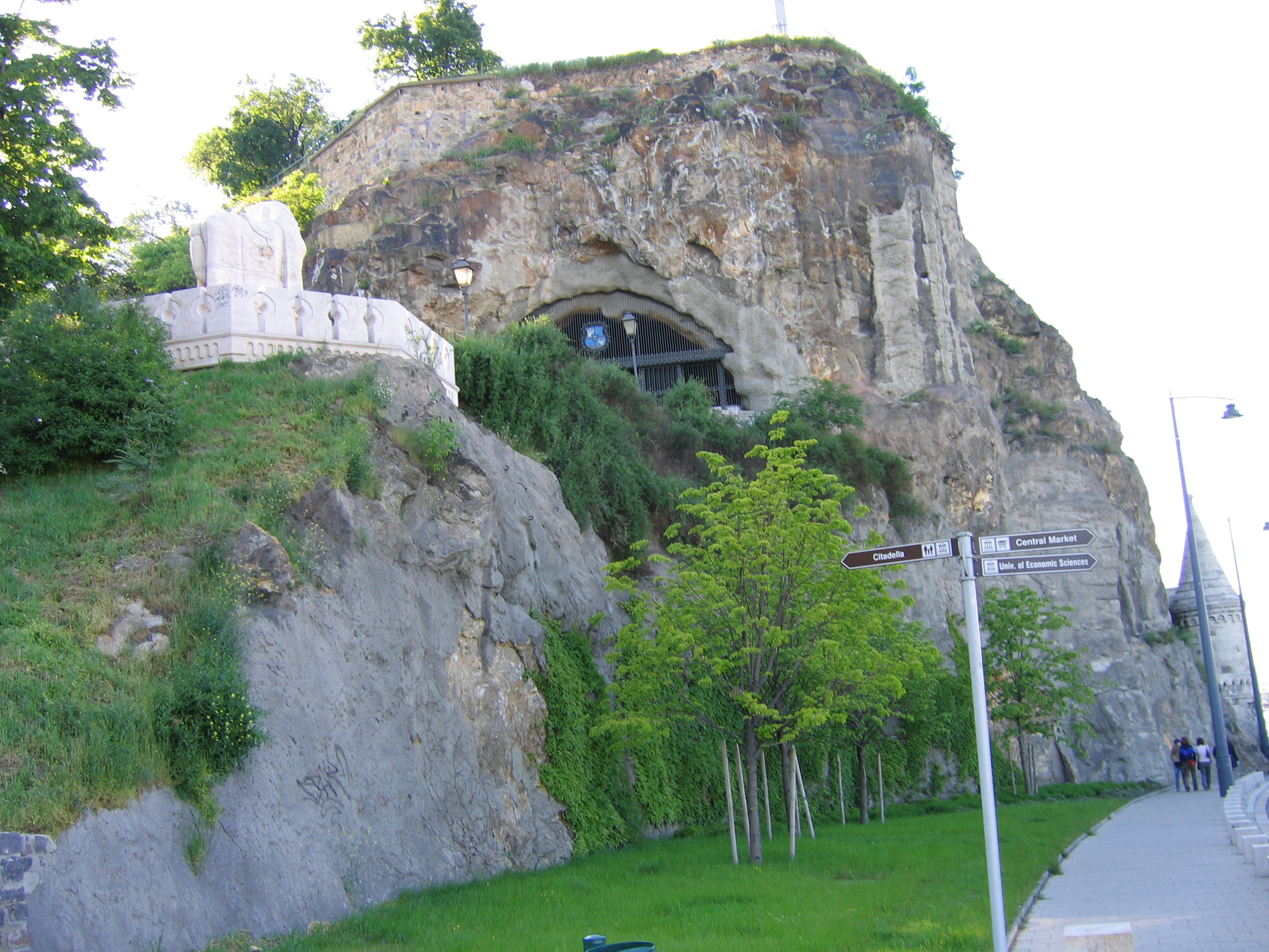 Gellért Hill Cave (Szent Gellért tér) Budapest, Hungary